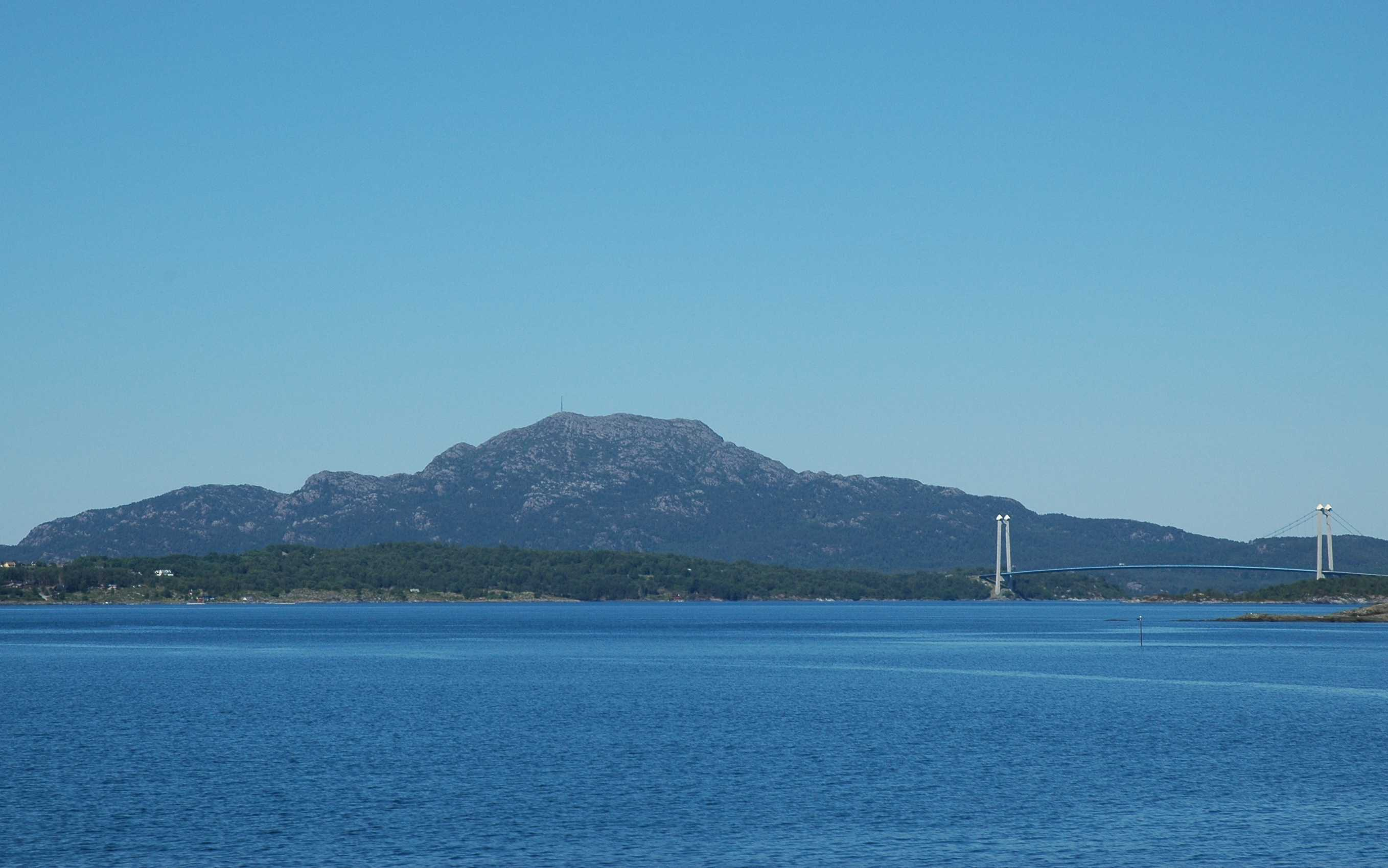 Siggjo og Bømlabrua.